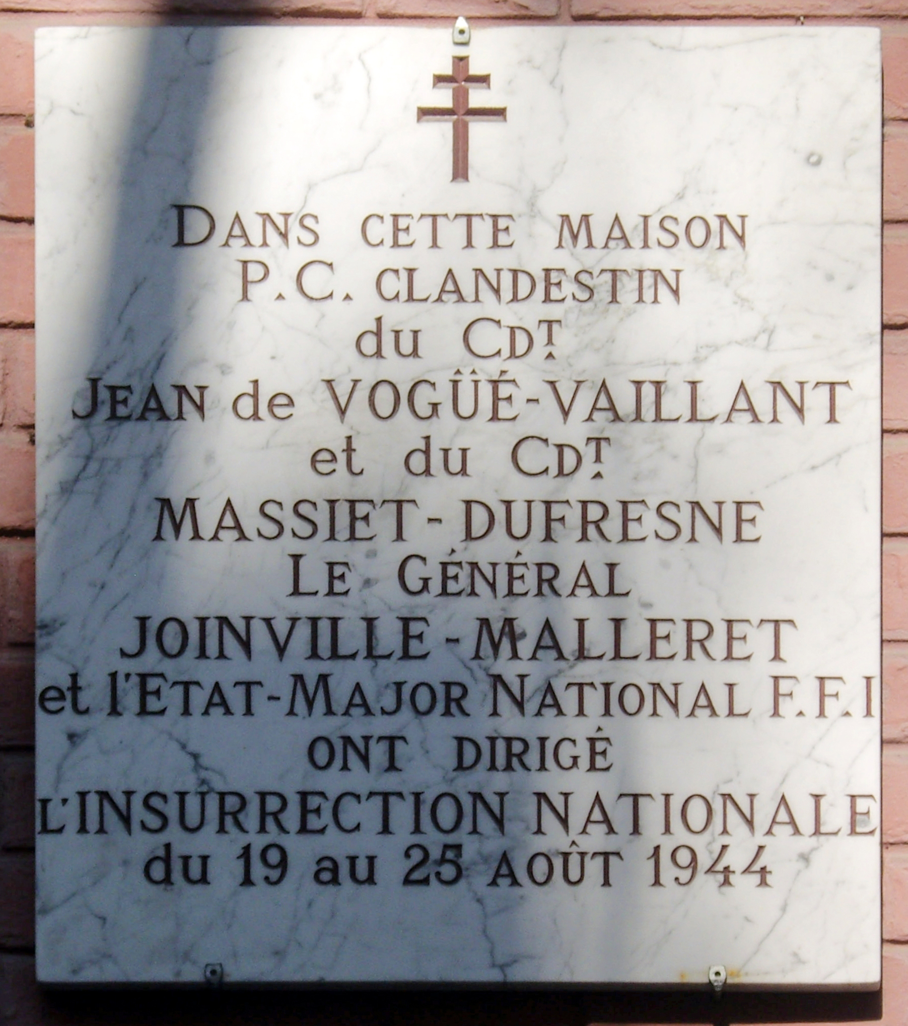 Plaque apposée au n° 39 de l'avenue de La Bourdonnais, Paris 7e. « Dans cette maison, PC clandestin du Cdt Jean de Vogüé-Vaillant et du Cdt Massiet-Dufresne, le général Joinville-Malleret et l'état-major national FFI ont dirigé l'insurrection nationale du 19 au 25 août 1944. »